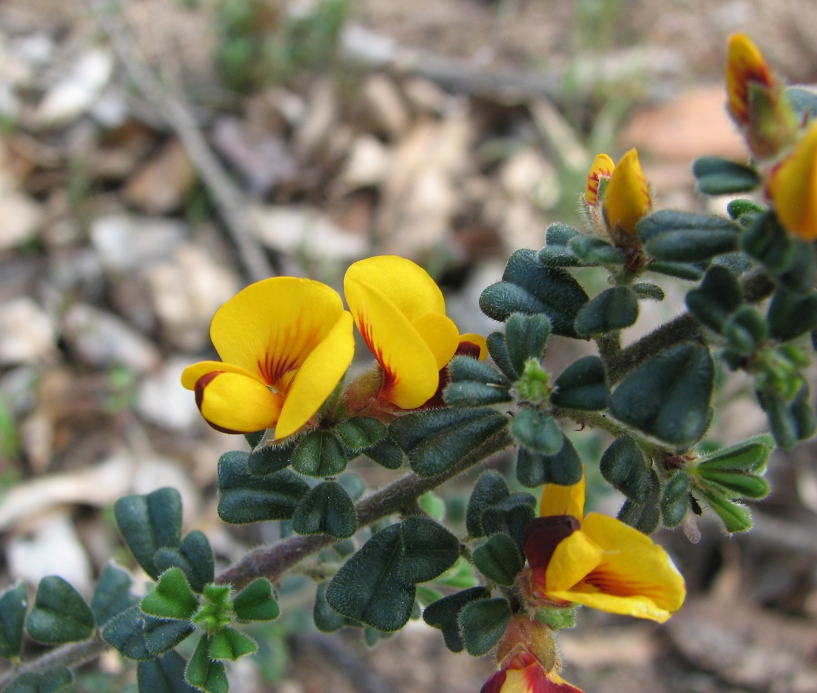 Pultenaea scabra Brisbane Ranges, Victoria, Australia